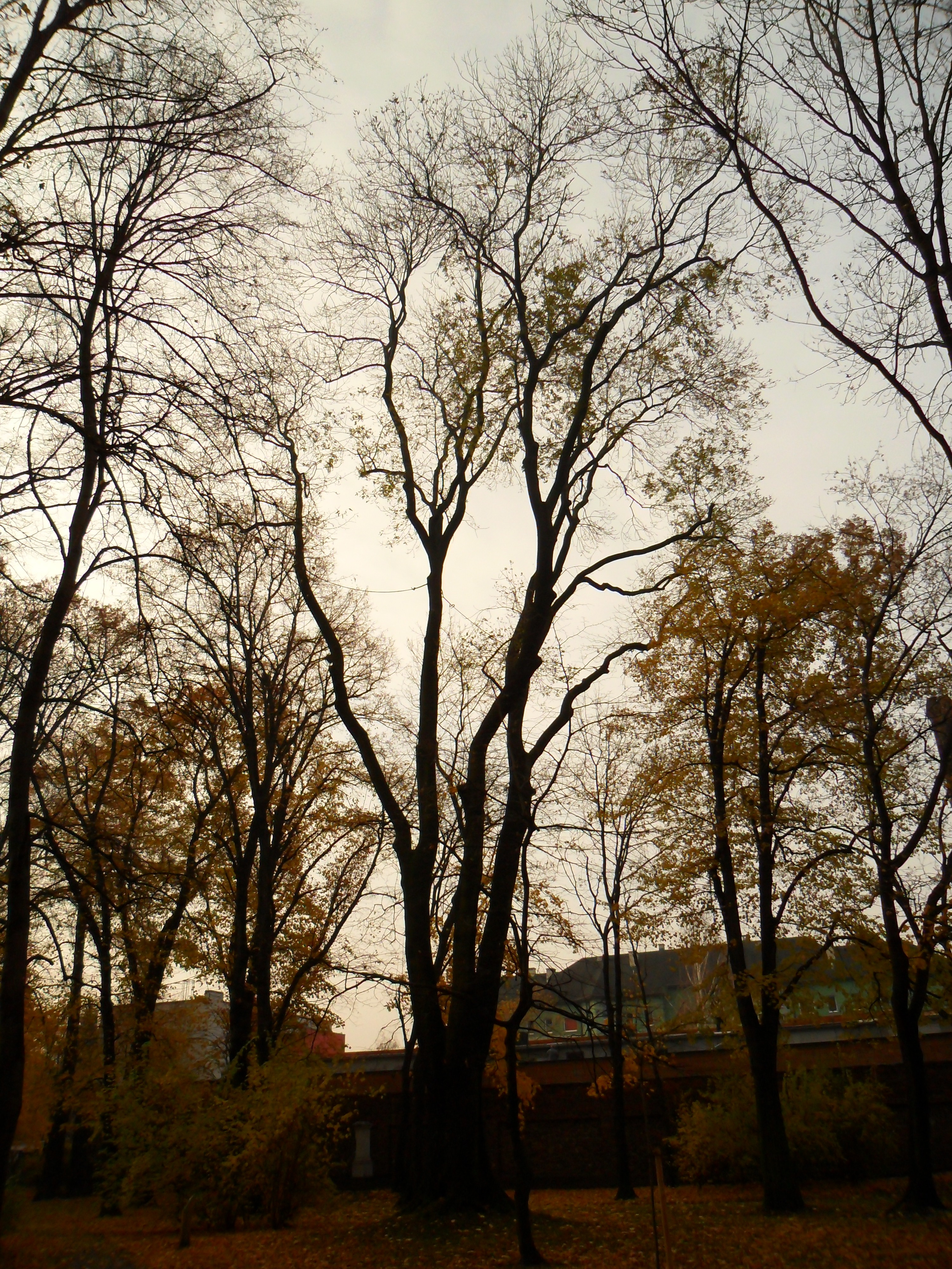 Jesion wyniosły w parku im. Miasta Roth w Raciborzu. Ustanowiony pomnikiem przyrody.